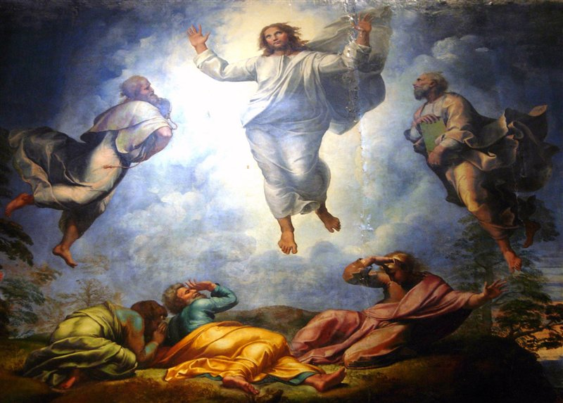 Vatican Museum Pinacoteca